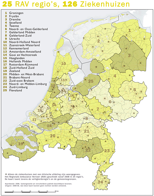 25 RAV (Regionaal Ambulance Vervoer) regio's, en 126 ziekenhuizen. Situatie 2008.